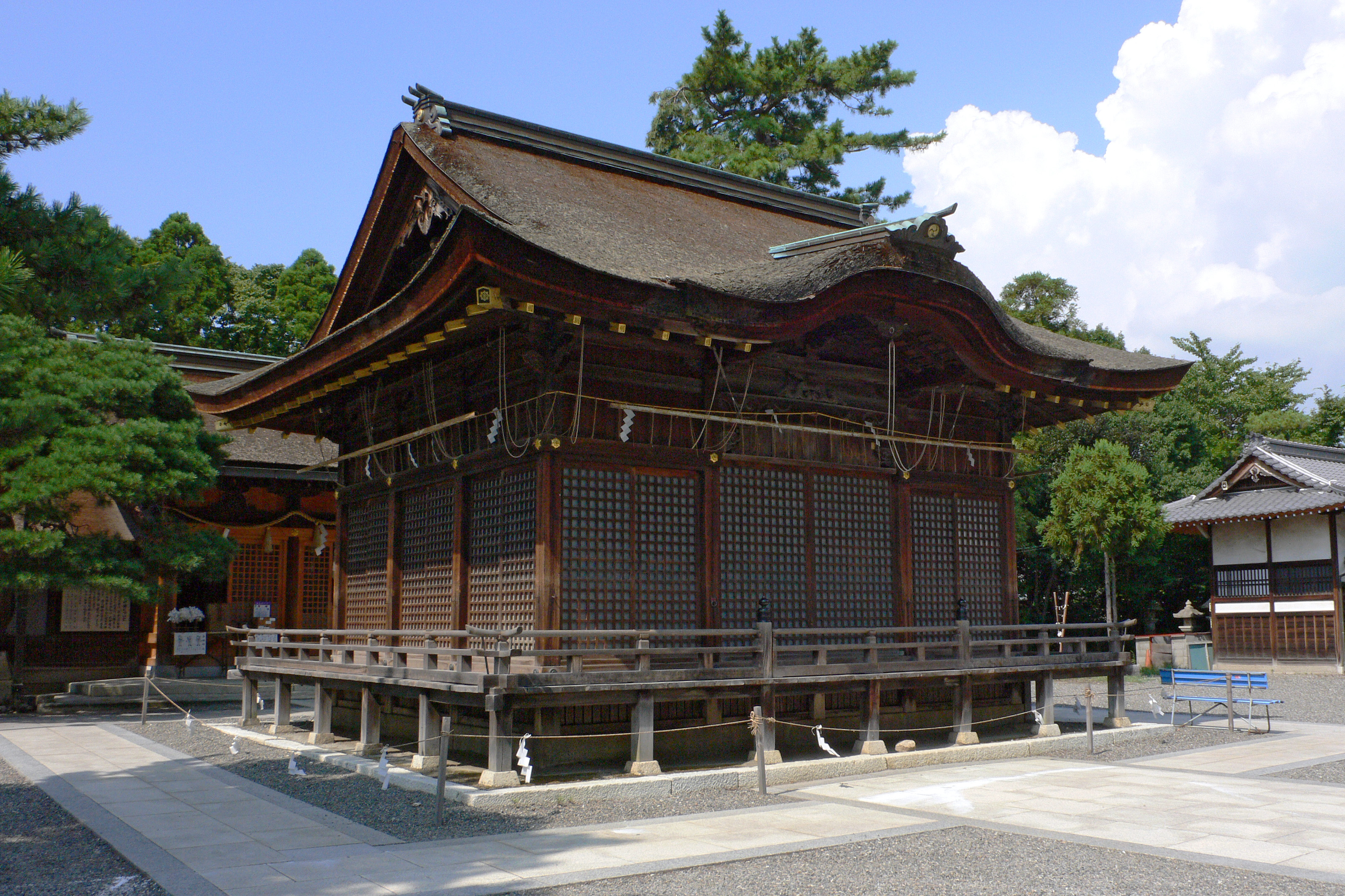 Nagahama-hachimangu in Nagahama, Shiga, Japan